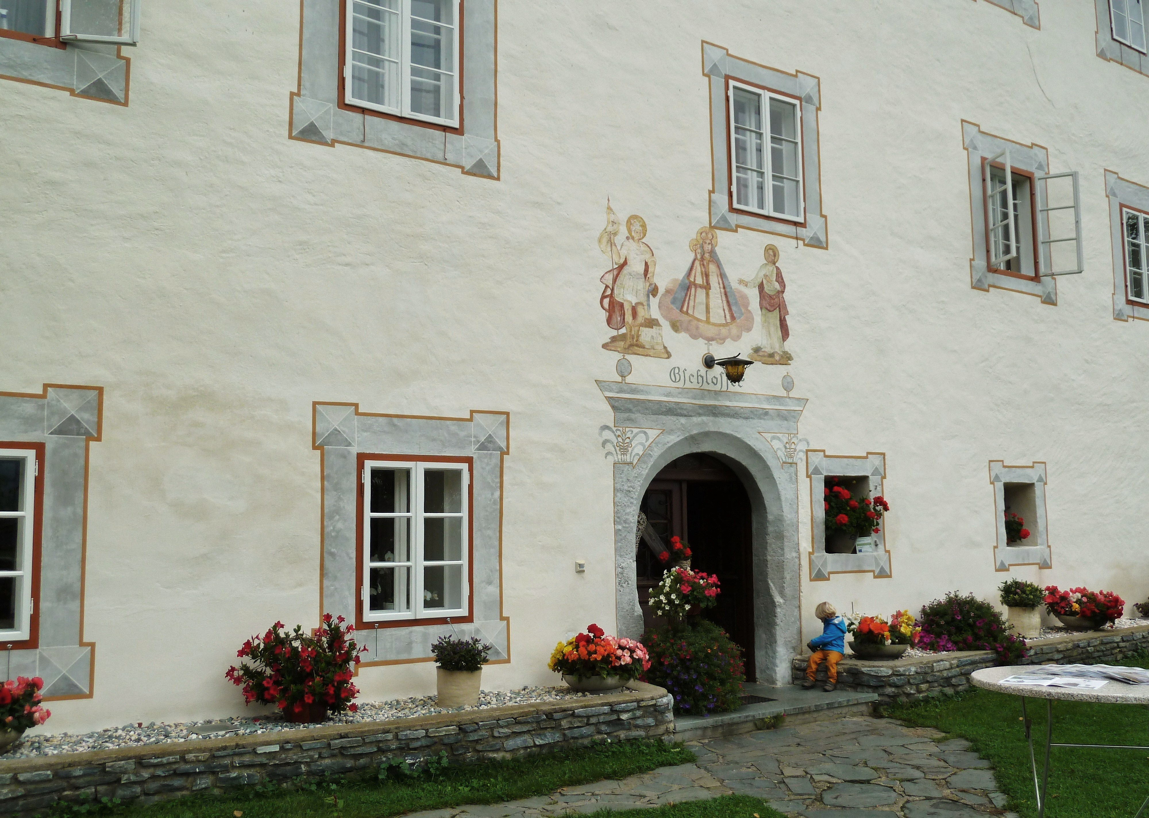 Tiffen, Nr. 30, vulgo "Gschlosser". Vorder-(Südost-)Seite des heutigen Bauernhofes mit Eingang - restauriert in der Renaissance-Fassung. Dieses Bild wurde anlässlich des österreichischen Tags des Denkmals 2012 in Kärnten eingereicht.